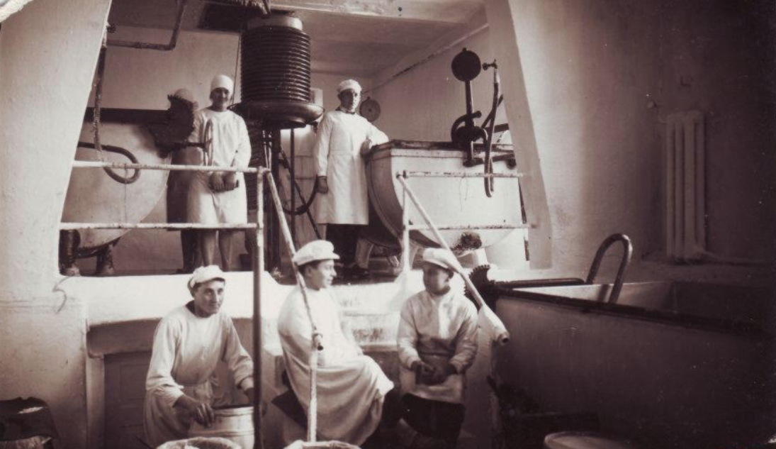 Rūjienas koppienotava 20. gadsimtā